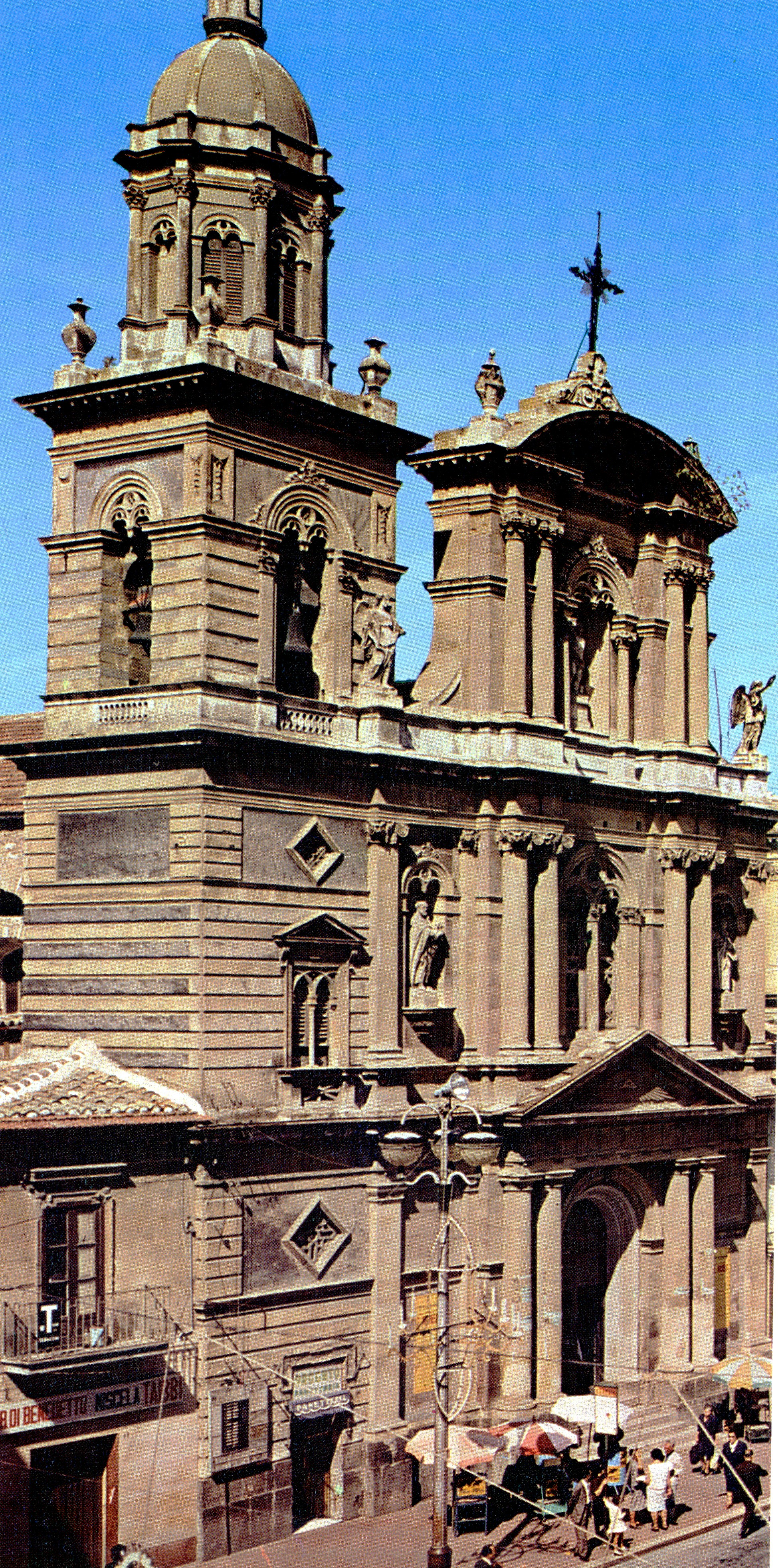 Chiesa di San Sebastiano a Caltanissetta.